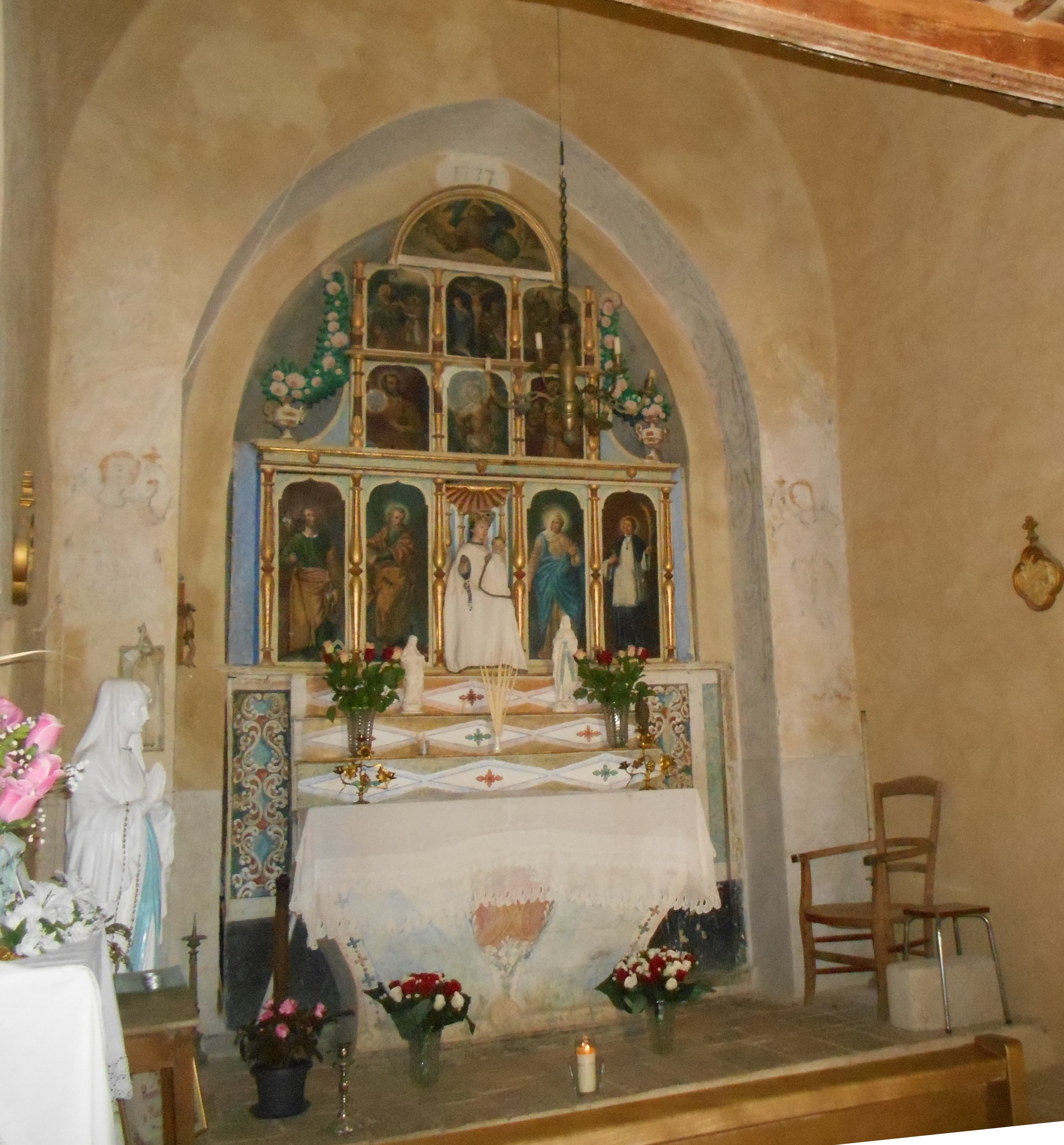 Interior de la Mare de Déu de la Roure